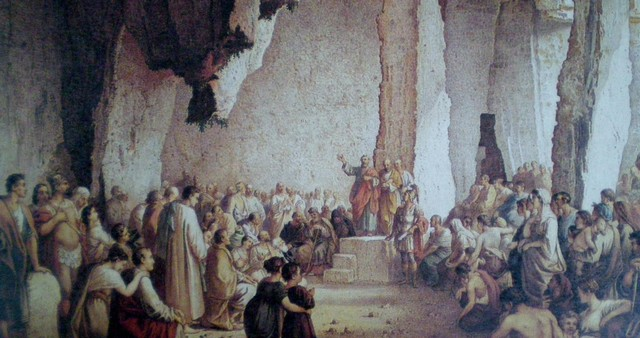 L'apostolo San Paolo predica nelle latomie siracusane, dipinto del palermitano Francesco Paolo Priolo